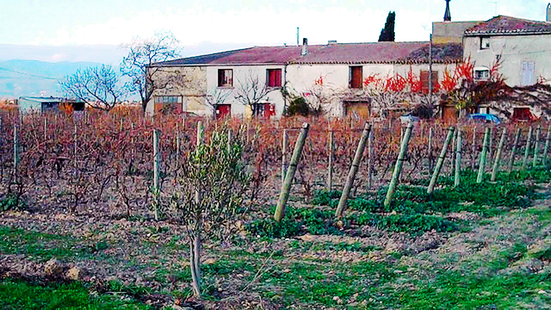 Domaine des Homs à Rieux-Minervois